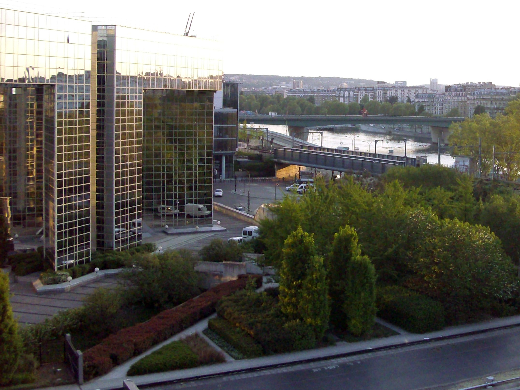 A la derecha de la imagen: edificio "Le Ponant" obra del arquitecto Olivier-Clément Cacoub (Coordenadas: 48°50'24"N 2°16'24"E); en su interior puede verse la escultura titula "Hommage à Claude-Nicolas Ledoux" (Homenaje a Claude-Nicolas Ledoux) columna quebrantada , obra de los artistas Anne et Patrick Poirier. A la izquierda de la imagen: el río Sena cruzado por el Puente de Garigliano, sobre el que se ha instalado la escultura titulada "El teléfono" de Frank Gehry(de color rojo - Coordenadas: 48°50'21"N 2°16'6"E )